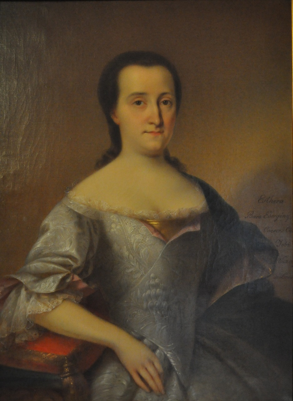 báró Ebergényi Eszter, az iregszemcsei templom építtetője, Viczay Jób felesége.